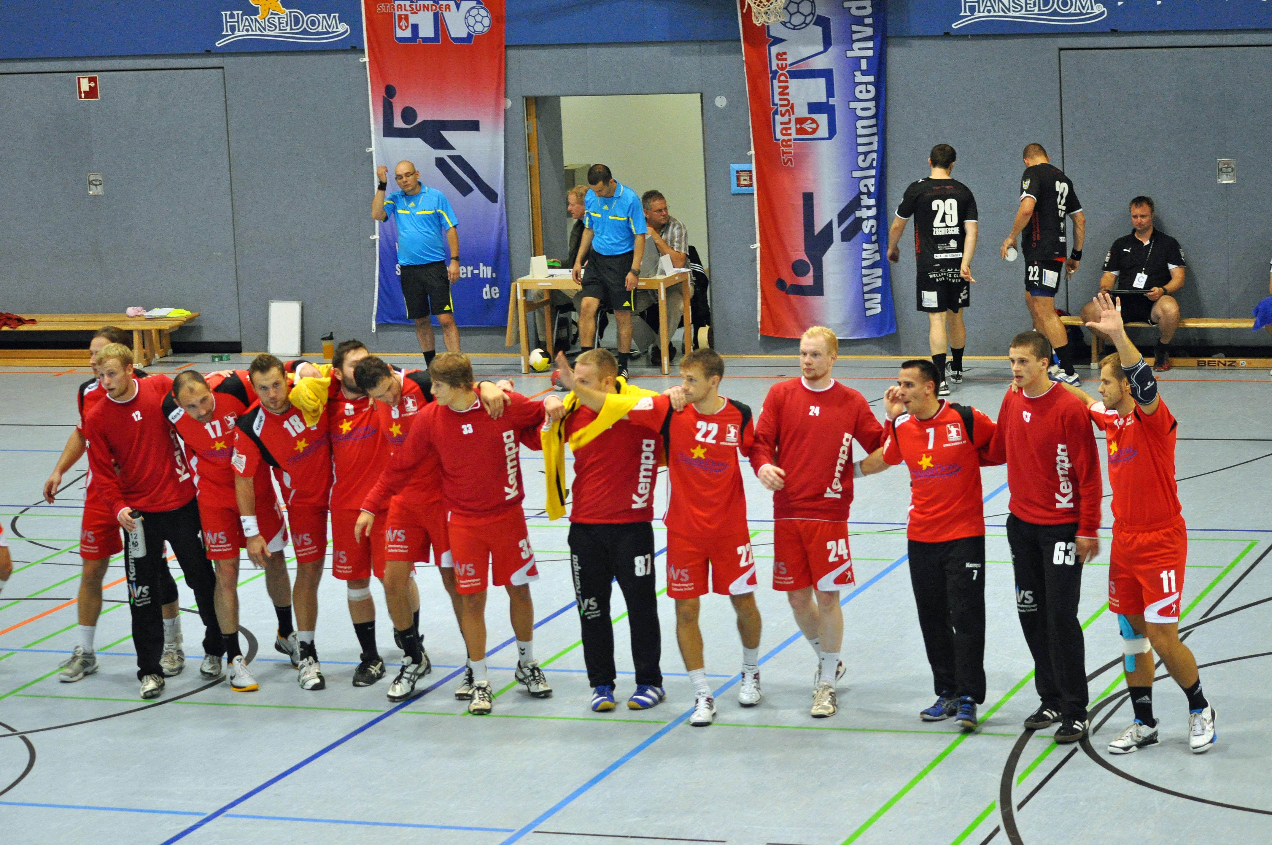 Die Fotos entstanden am 2. Spieltag der 3. Liga, Staffel Nord. Die Begegnung zwischen dem Stralsunder HV und den Wölfen Tarp-Wanderup in der Vogelsanghalle Stralsund endete 27:30.